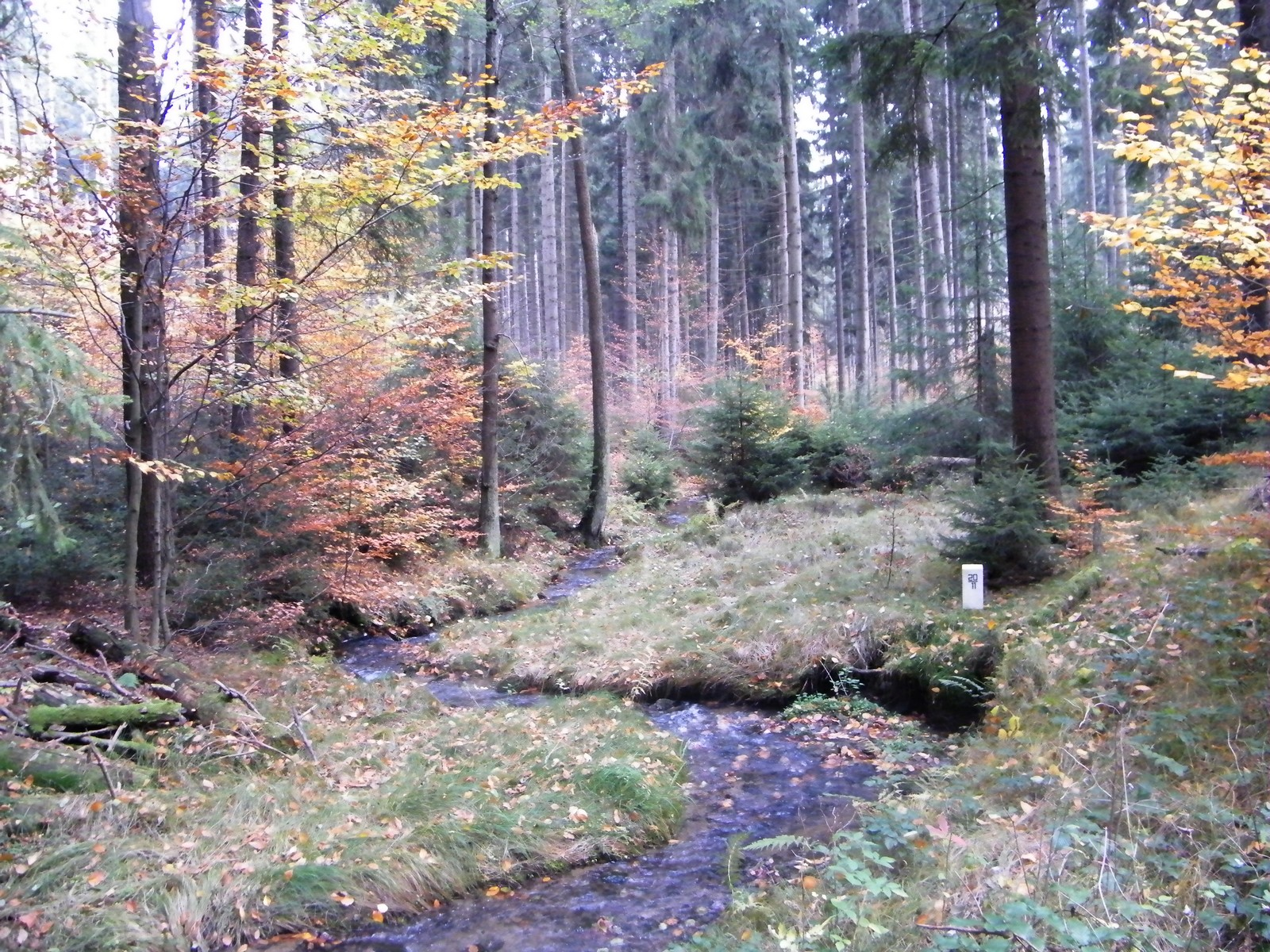 Bílý potok, přítok Křinice